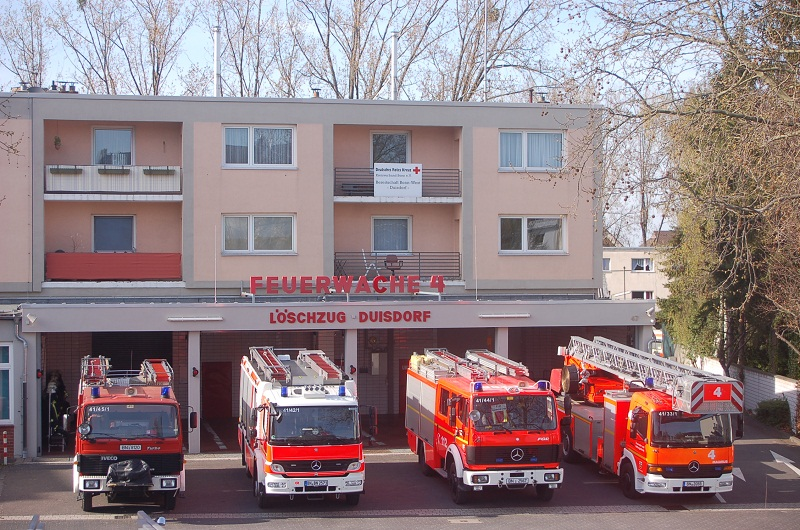 Wachgebäude Feuerwache 4 - Löscheinheit Duisdorf, Am Burgweiher 47–49, Bonn-Duisdorf